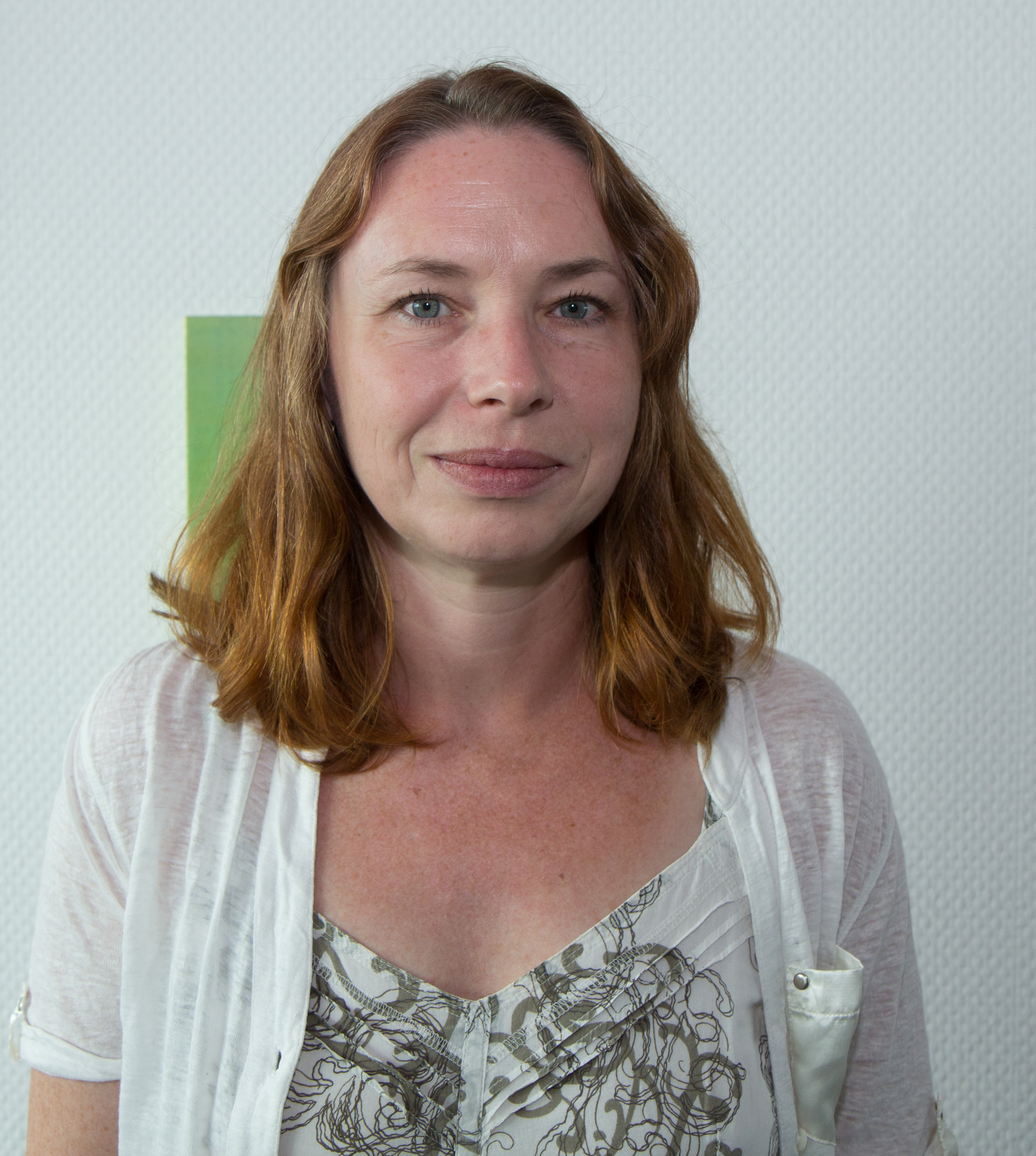 Zusana Storchová: Pressekonferenz im rheinland-pfälzischen Ministerium für Wissenschaft, Weiterbildung und Kultur am 7. August 2018 in Mainz.